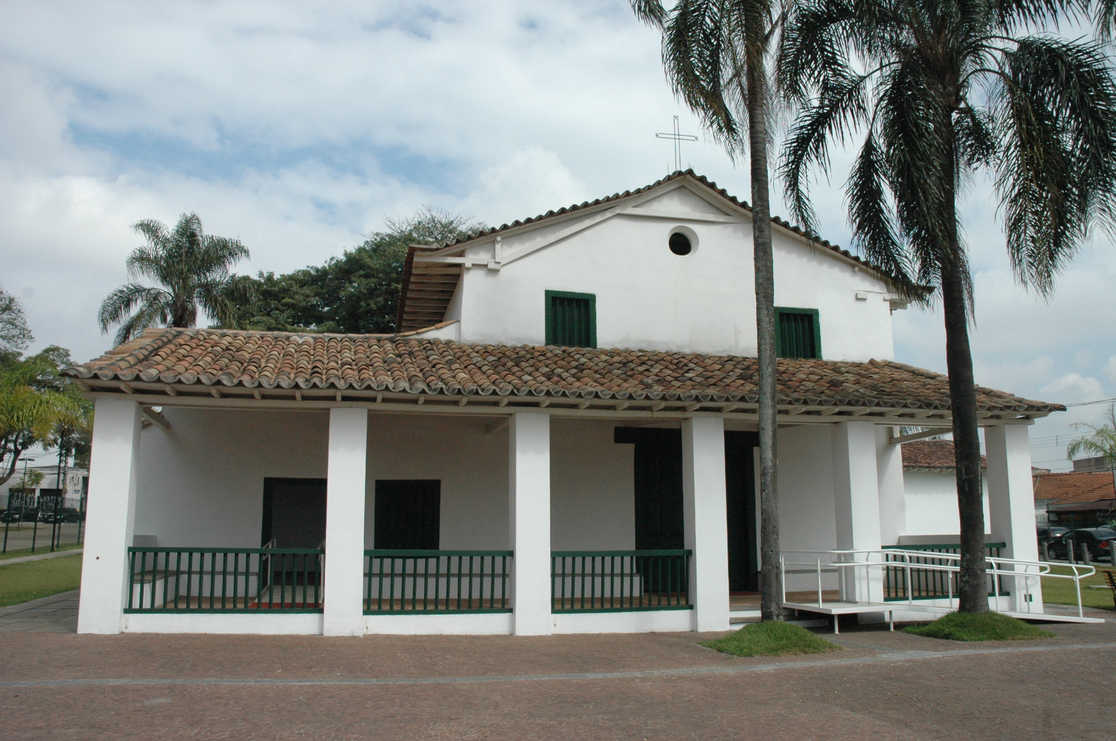 A ministra da Cultura, Ana de Hollanda, visitou a Capela de São Miguel Arcanjo, na Zona Leste Paulista, na manhã desta segunda-feira (09/05/11). Ela foi conhecer o trabalho de restauração recentemente concluído da mais antiga capela da cidade de São Paulo – construída em 1622, pelos índios Guaianases, na época da ocupação do Planalto Paulista – e um dos primeiros prédios tombados pelo patrimônio histórico e artístico nacional. Foto: Augusto Canuto